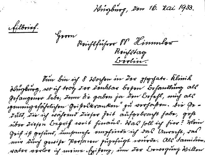 Brief Theodor Eickes an Heinrich Himmler vom 16. Mai 1933 (Ausschnitt)Transkription:Würzburg, den 16. Mai 1933 Eilbrief. Herrn Reichsführer SS Himmler Reichstag Berlin. Nun bin ich 8 Wochen in der psych[i]atr. Klinik Würzburg, wo ich trotz der denkbar besten Behandlung als Gefangener lebe, denn Sie gaben ja den Befehl, mich als "gemeingefährlichen Geisteskranken" zu verhaften. Die Ge- duld, die ich während dieser Zeit aufgebracht habe, geht über diesen Begriff weit hinaus. Was soll ich hier? [Mein?] Geist ist gesund, umsomehr empfinde ich das Unrecht, das mir durch gewisse Personen zugefügt wurde. Als Familien- vater verlor ich meine Existenz, um der Bewegung Willen Eicke bittet um die Aufhebung der gegen ihn verhängten „Schutzhaft“, der Brief entstand in der „Psychiatrische und Nervenklinik der Universität Würzburg“, in der Eicke zur Beobachtung seines Geisteszustands eingewiesen war.